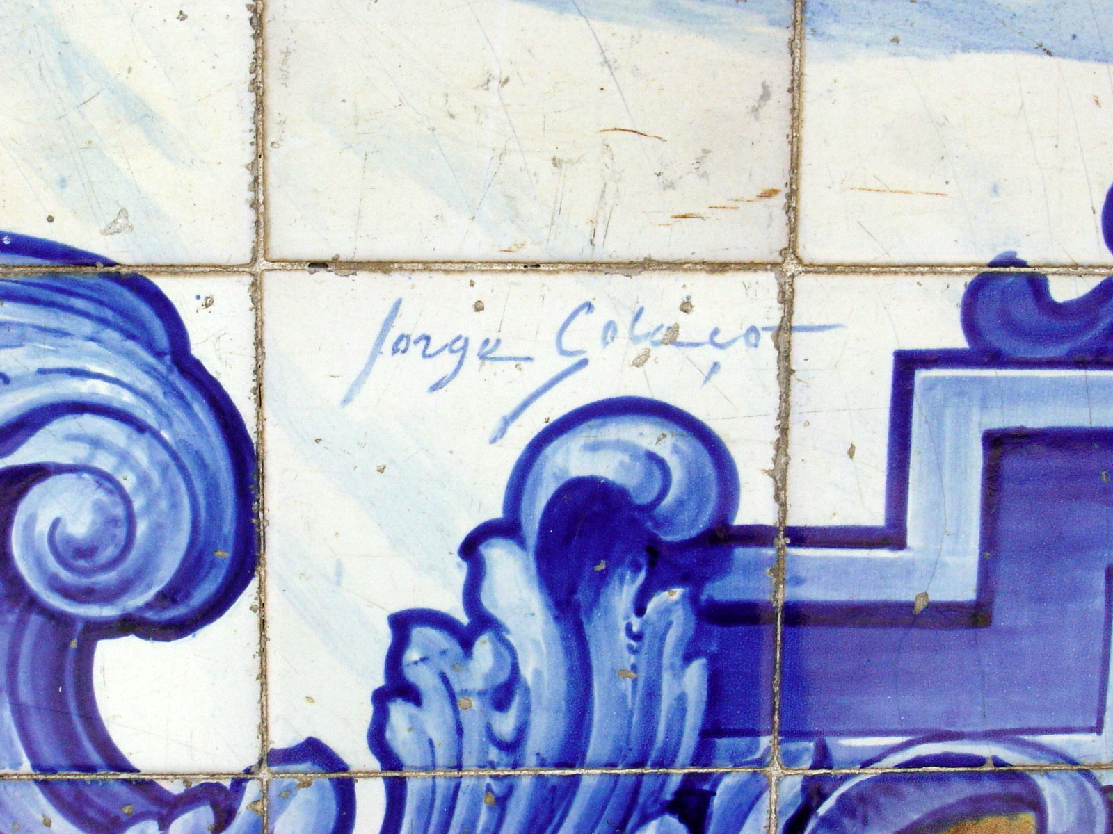 Assinatura do pintor e azulejista português Jorge Colaço